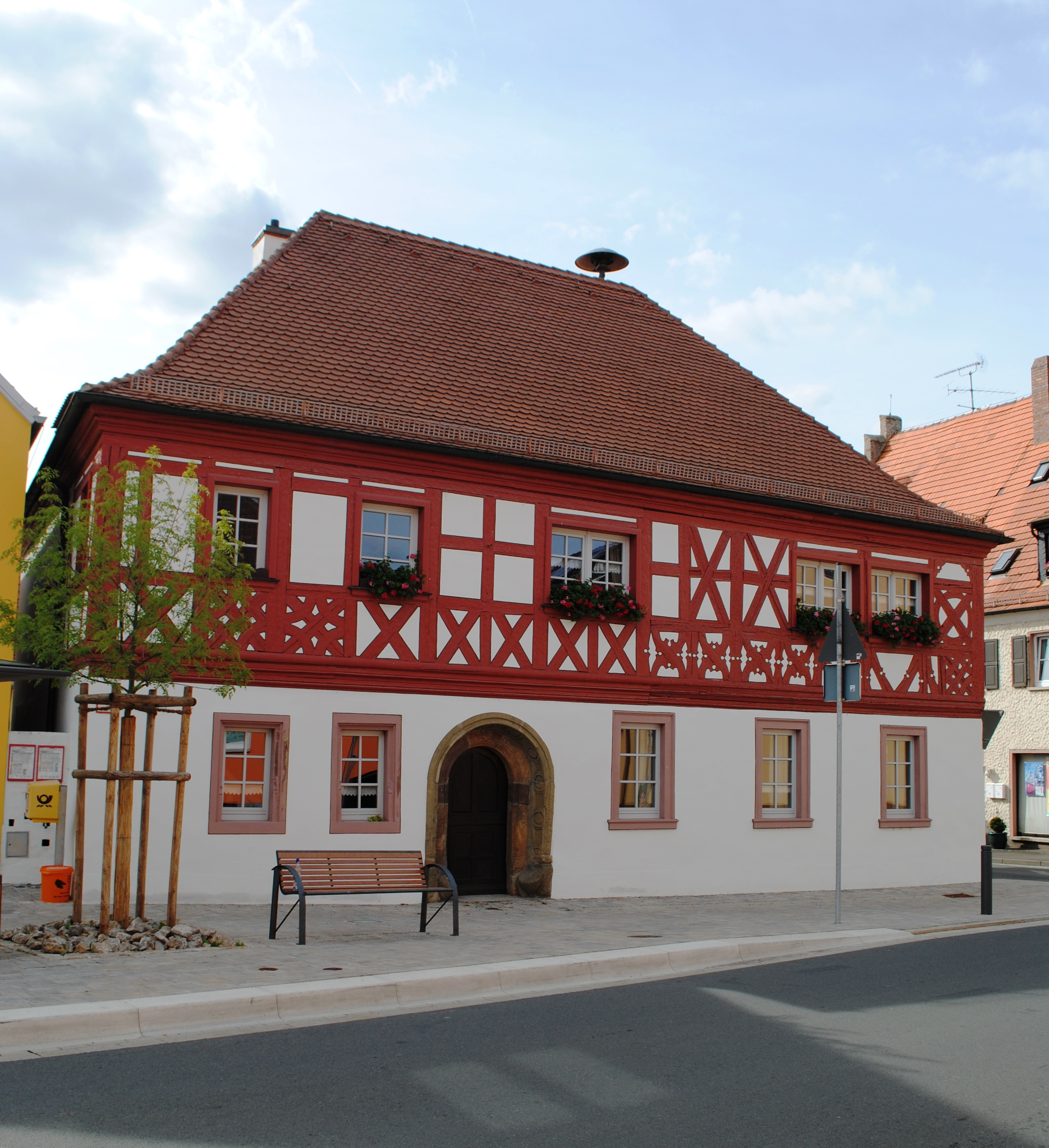 Wohnhaus, Marktplatz 8, StadtschwarzachThis is a photograph of an architectural monument.